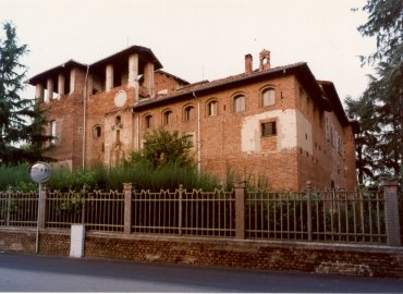 Castello Lampugnani a Sulbiate (provincia di Monza e della Brianza)